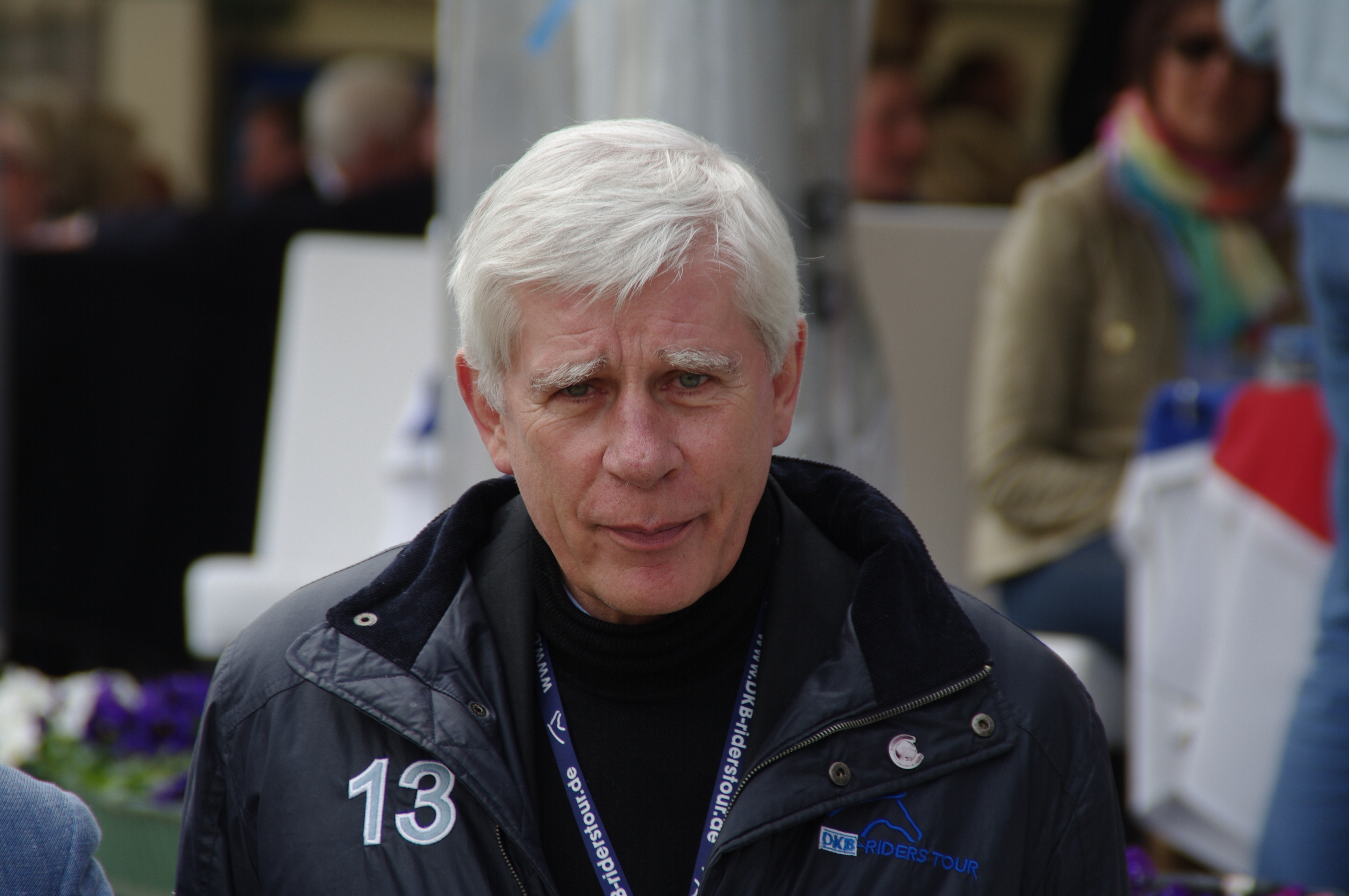 Paul Schockemöhle bei Horses&Dreams 2013